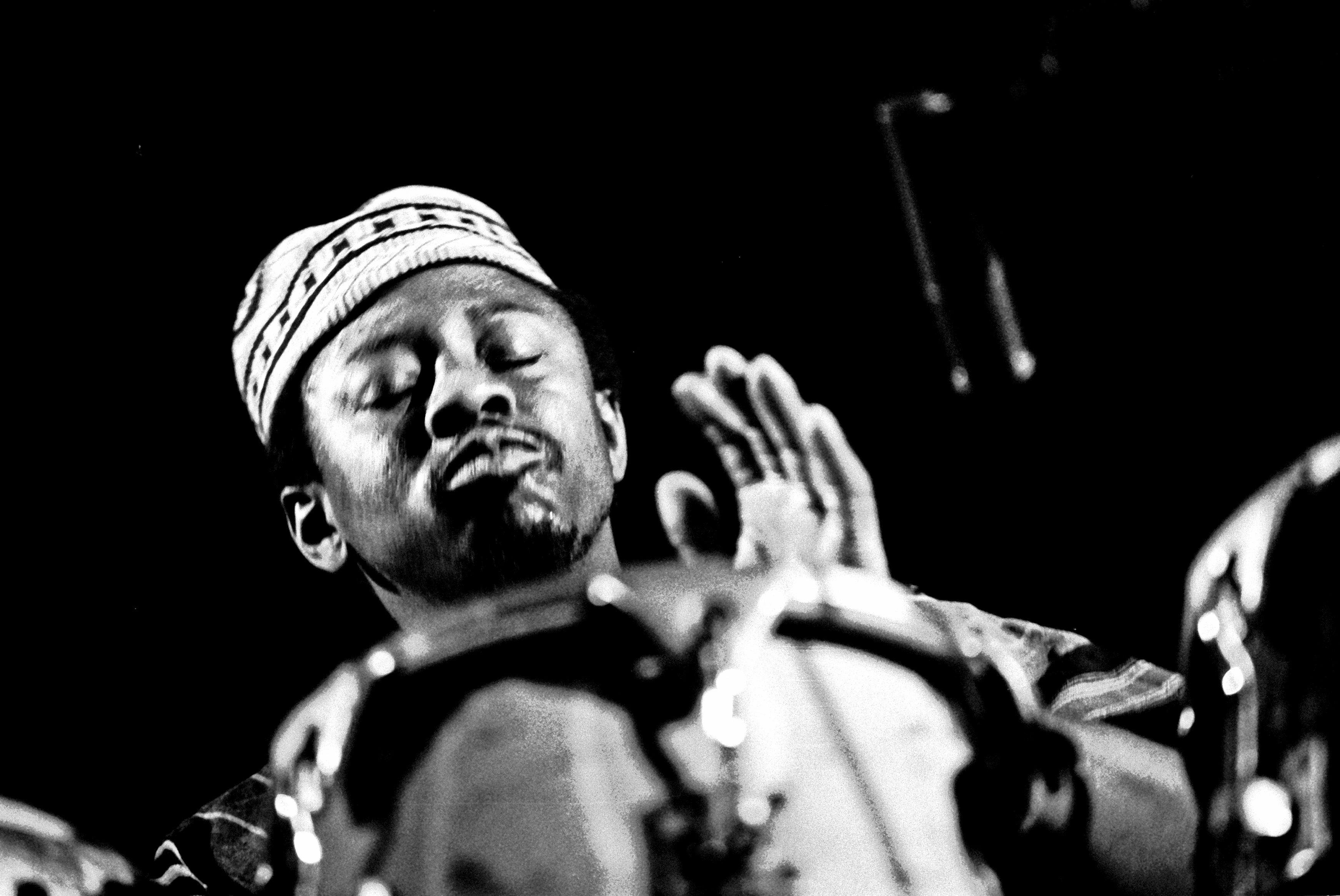 Percussionist Rebop Kwaku Baah - "Traffic" mit Steve Winwood und Pete Brown 1973 in der Musikhalle Hamburg